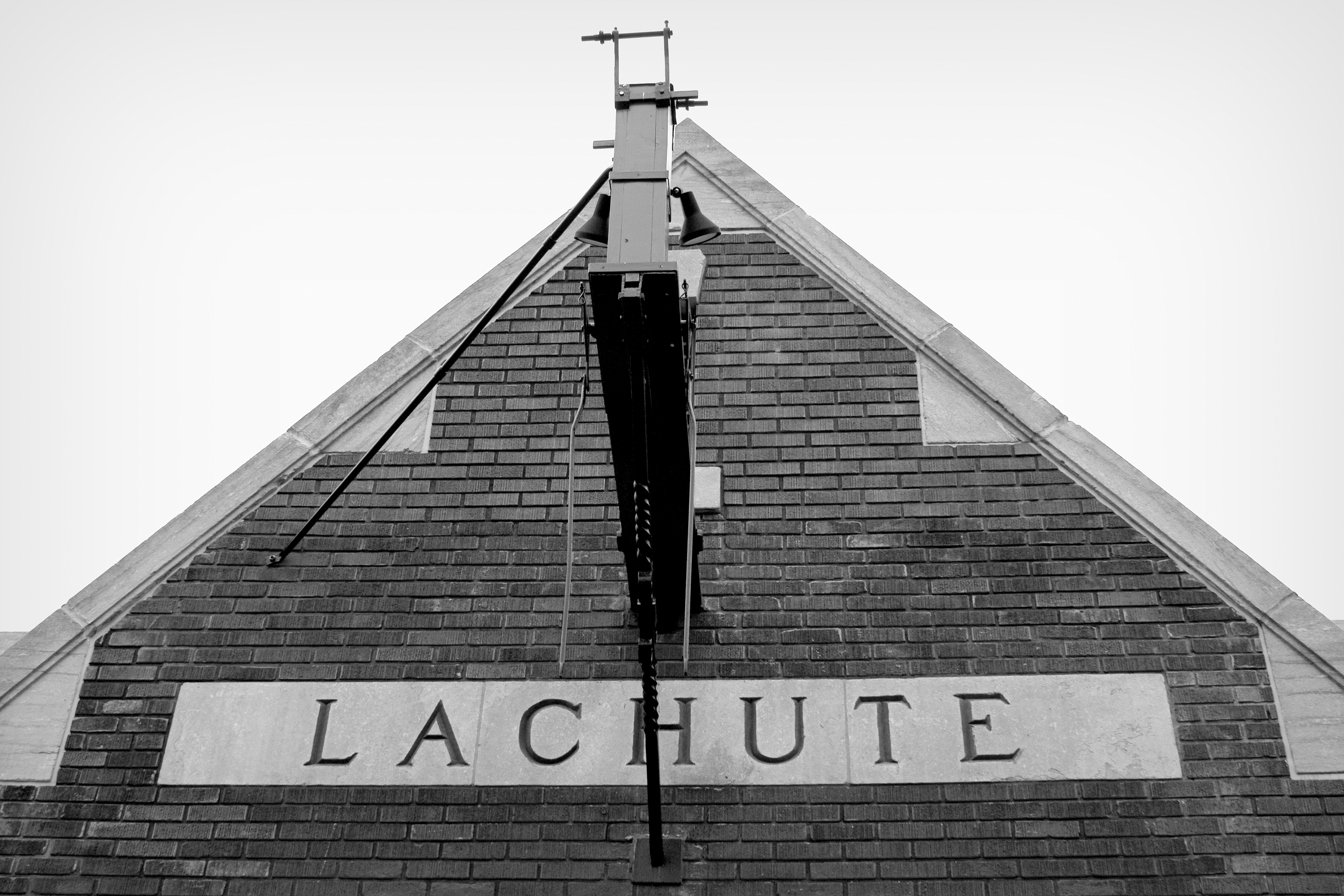 Gare de Lachute, 540, rue Berry, Lachute (Canada). (Protection MH cité. Voir la liste des lieux patrimoniaux des Laurentides pour plus de détails).